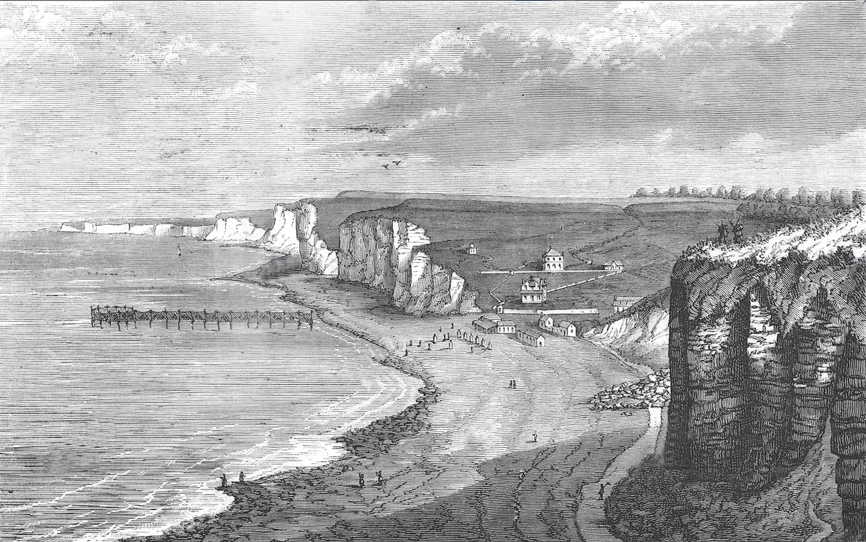 Gravure représentant la plage de Puys (près de Dieppe) et le camp de César. Journal des Voyages 1879